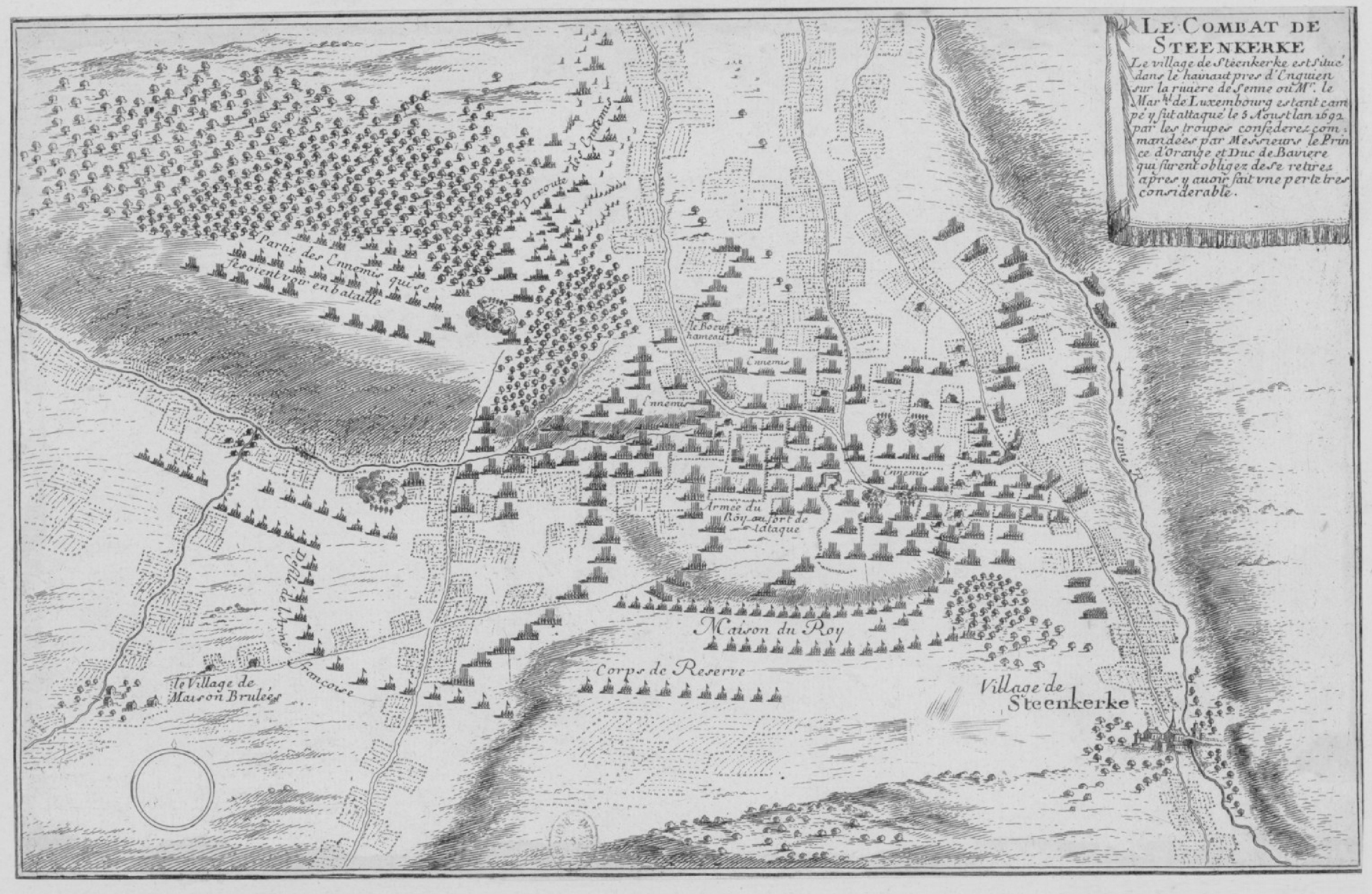 Bataille de Steenkerque 3 aout 1692